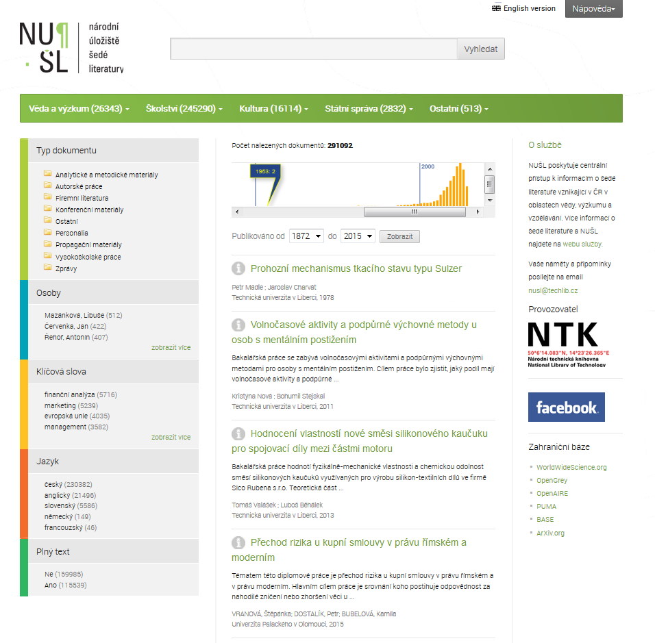 obrazovka centrálního rozhraní NUŠL